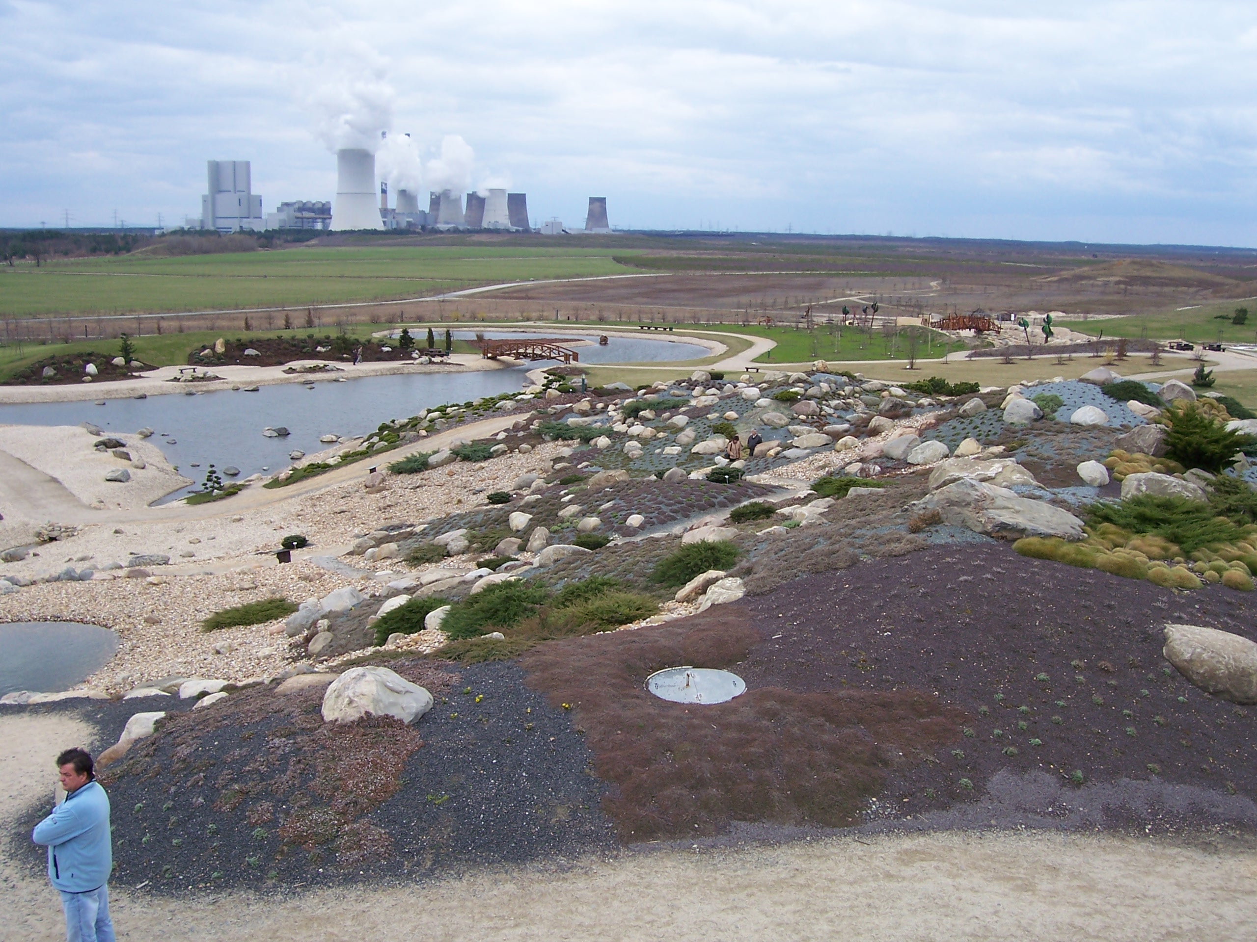 Findlingspark Nochten, im Hintergurnd das Braunkohlekraftwerk Boxberg